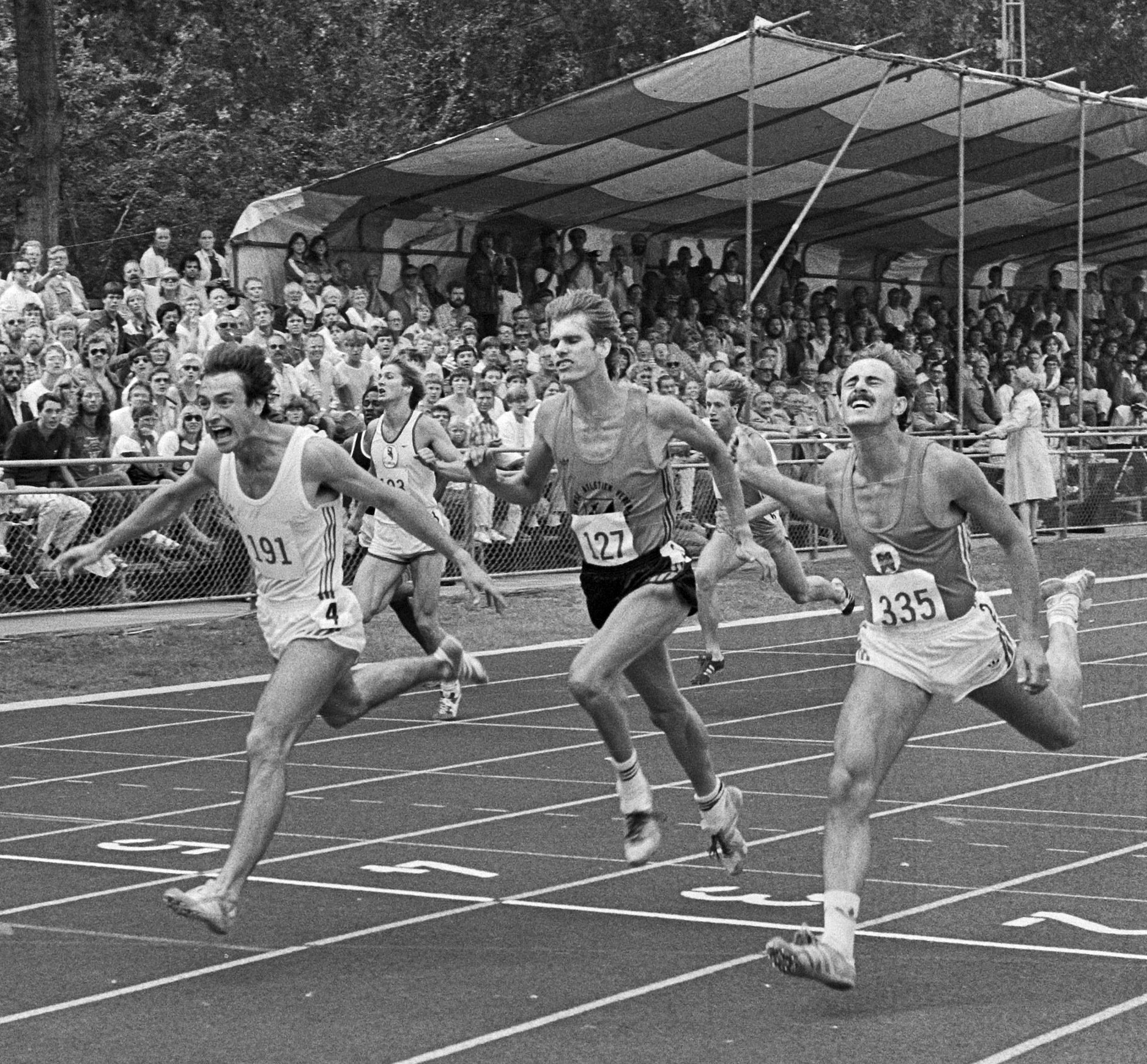 Ned. kampioenschappen atletiek 200 m heren: winnaar Mario Westbroek (191), Henk Brouwer (127) en Marcel Klarenbeek (355)